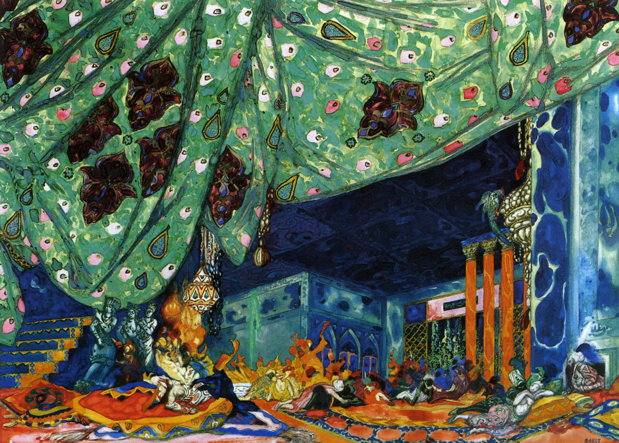 Декорация к балету «Шехерезада» по эскизу Л. Бакста